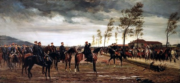 surrender of Metz